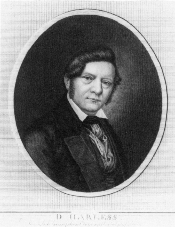 Adolf Gottlieb Christoph (von) Harleß